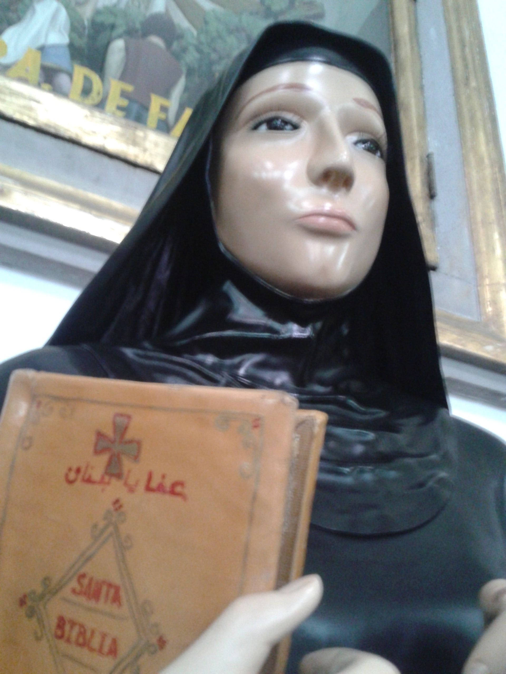 Figura de Rebeca de Himlaia, o St. Rafka, en la Catedral San Marón (Ntra. Sra. de Balvanera), Santuario San Charbel, en el Centro Histórico de la ciudad de México.